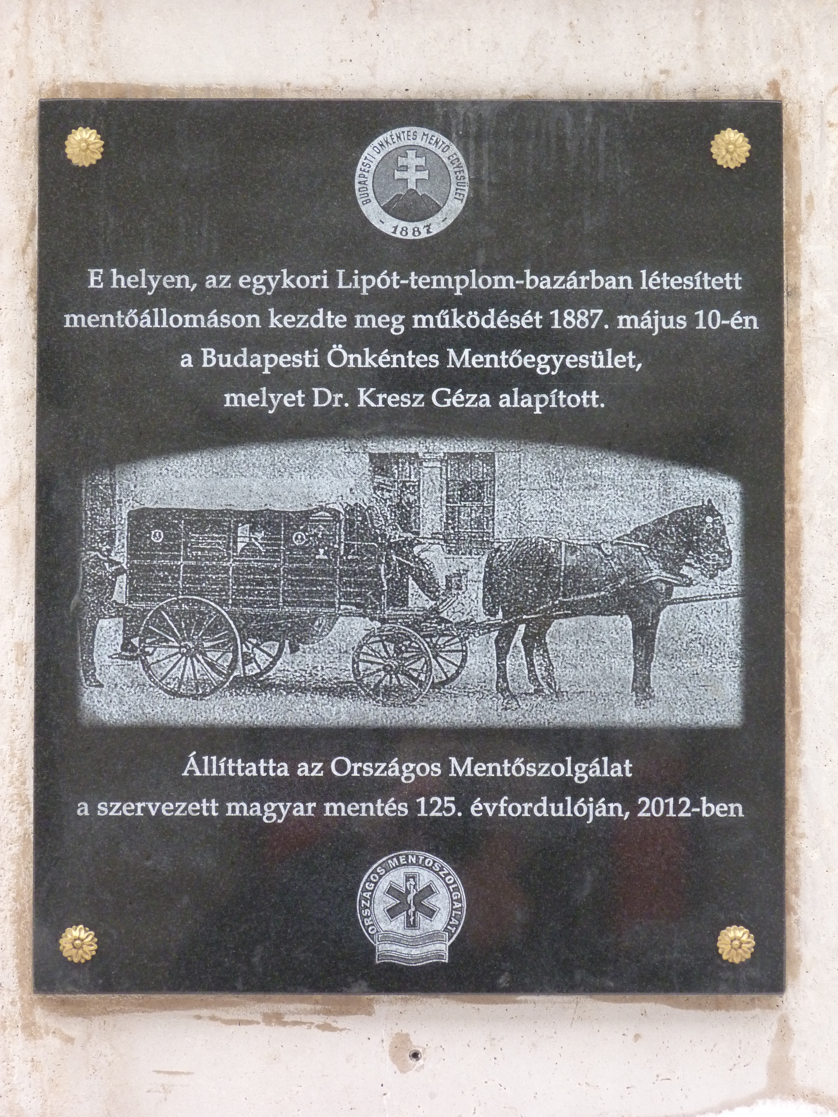 A felvétel 2013. január 14 -én készült. Budapest, a belvárosi Szent István Bazilika kőkerítése. A Kresz Géza által alapított Budapesti Önkéntes Mentőegyesület emléktáblája. 1887. május 10 -én ezen a helyen, az egykori Lipót templom bazárban léterített mentőállomáson kezdte meg működését a Budapesti Önkéntes Mentőegyesület. Cimkék: Kresz Géza Budapesti Önkéntes Mentőegyesület 1887 Lipót templom bazár